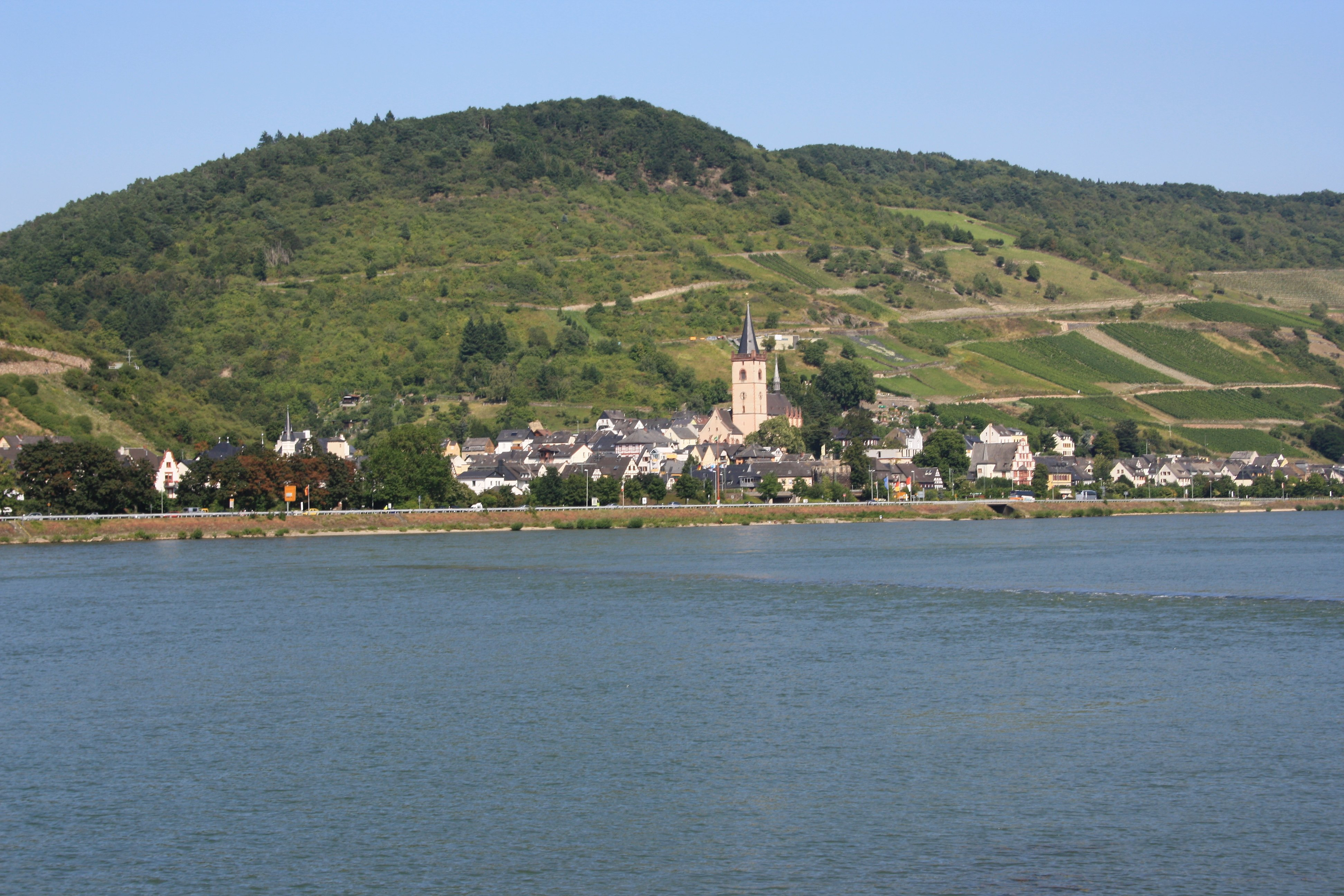 Lorch